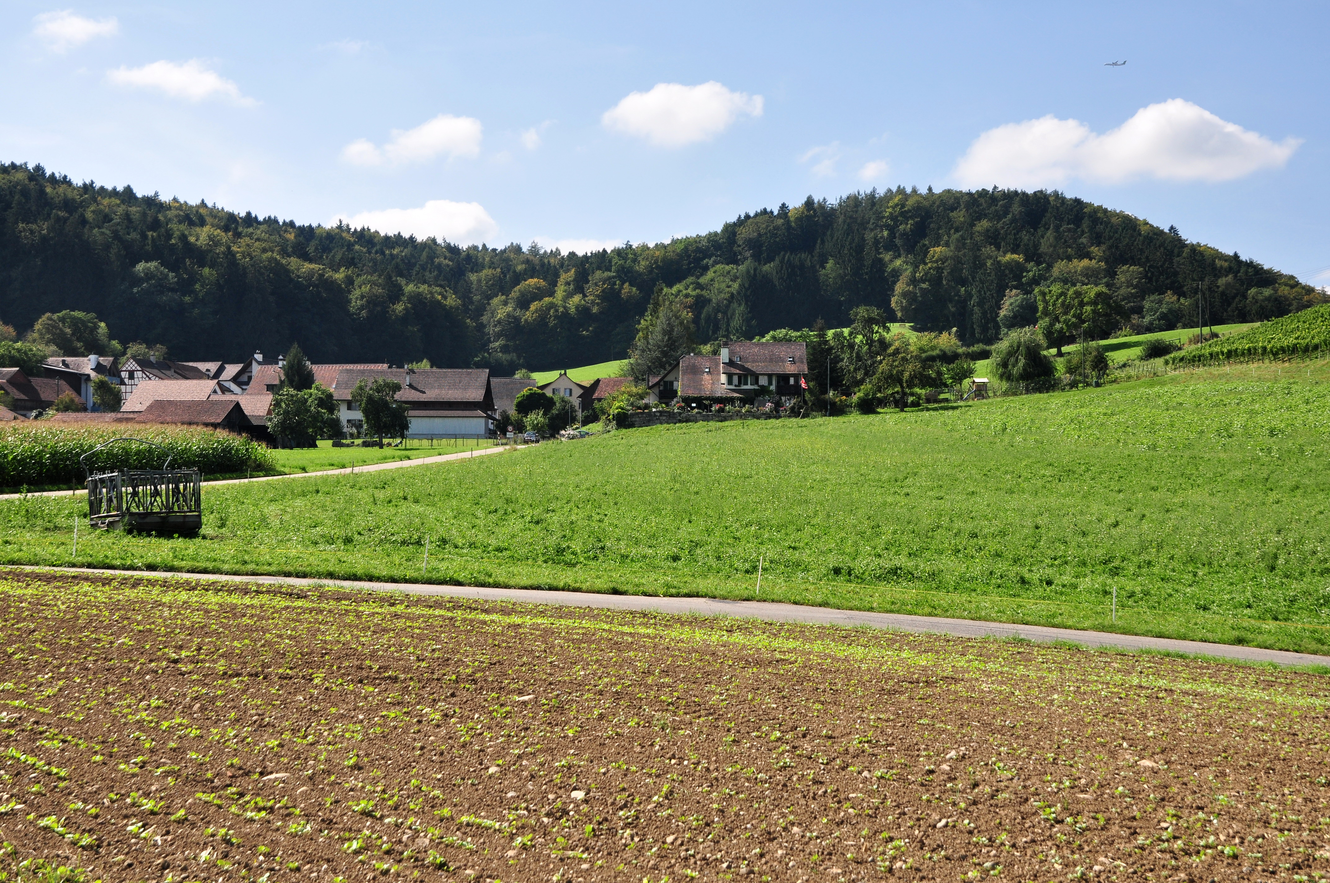 Zweidlen-Schlossbuck, Teil der spätrömischen Rheinbefestigung in Glattfelden (Switzerland)